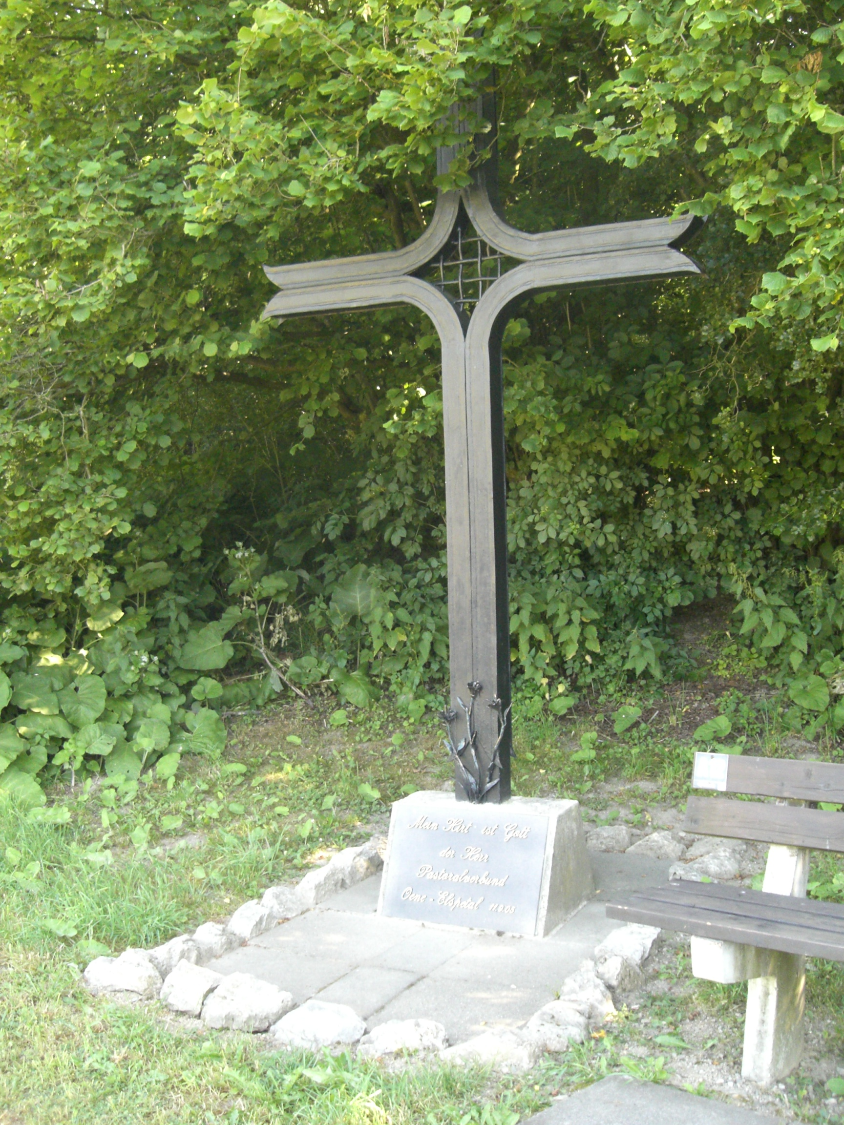 Gedenkkreuz im Elspetal bei Oberelspe, Sockelinschrift: Mein Hirte ist Gott der Herr, Pastotaverbund Elspe-Oenetal 11.09.2005